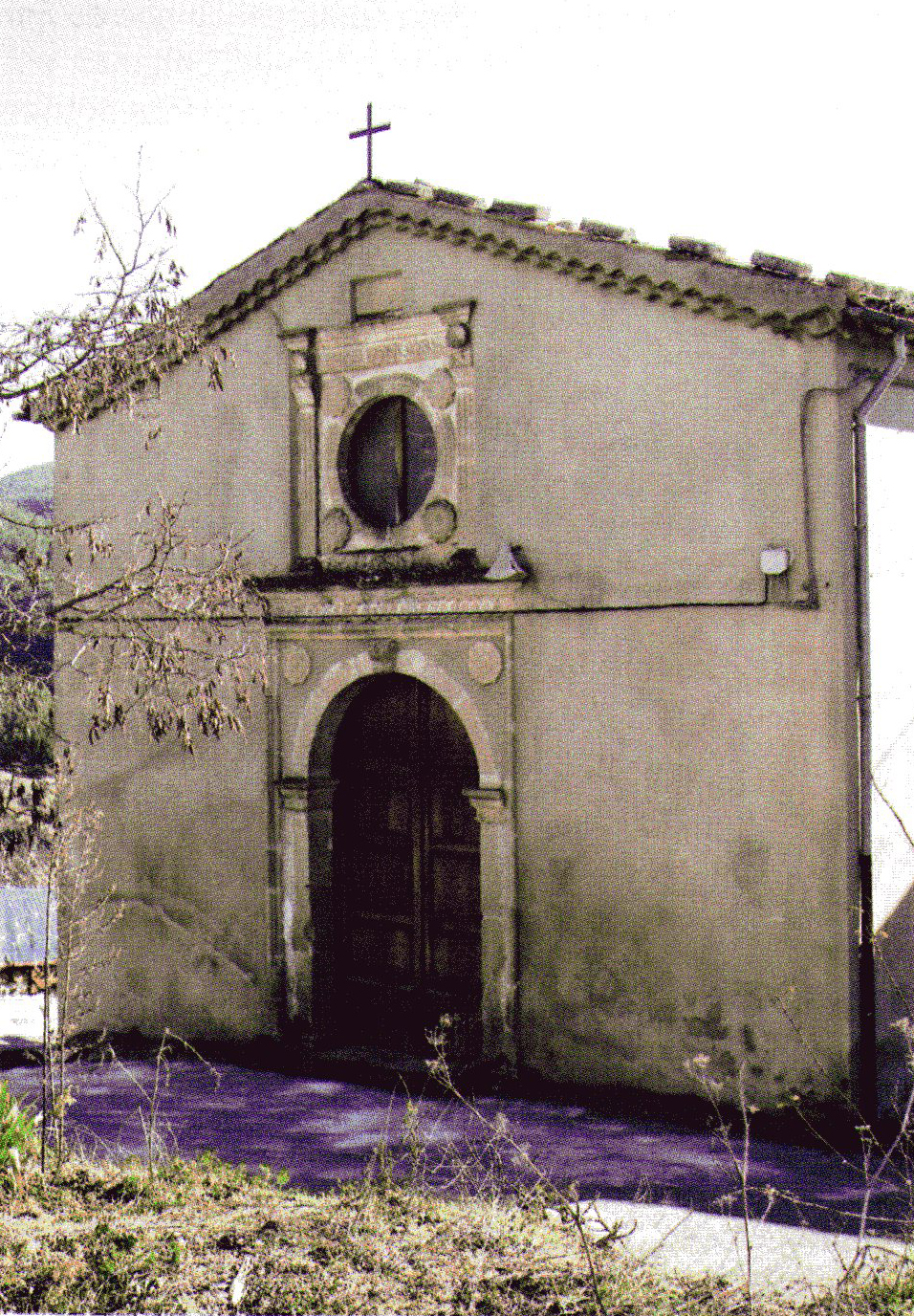 La facciata nel 2004 prima dell'ultimo restauro